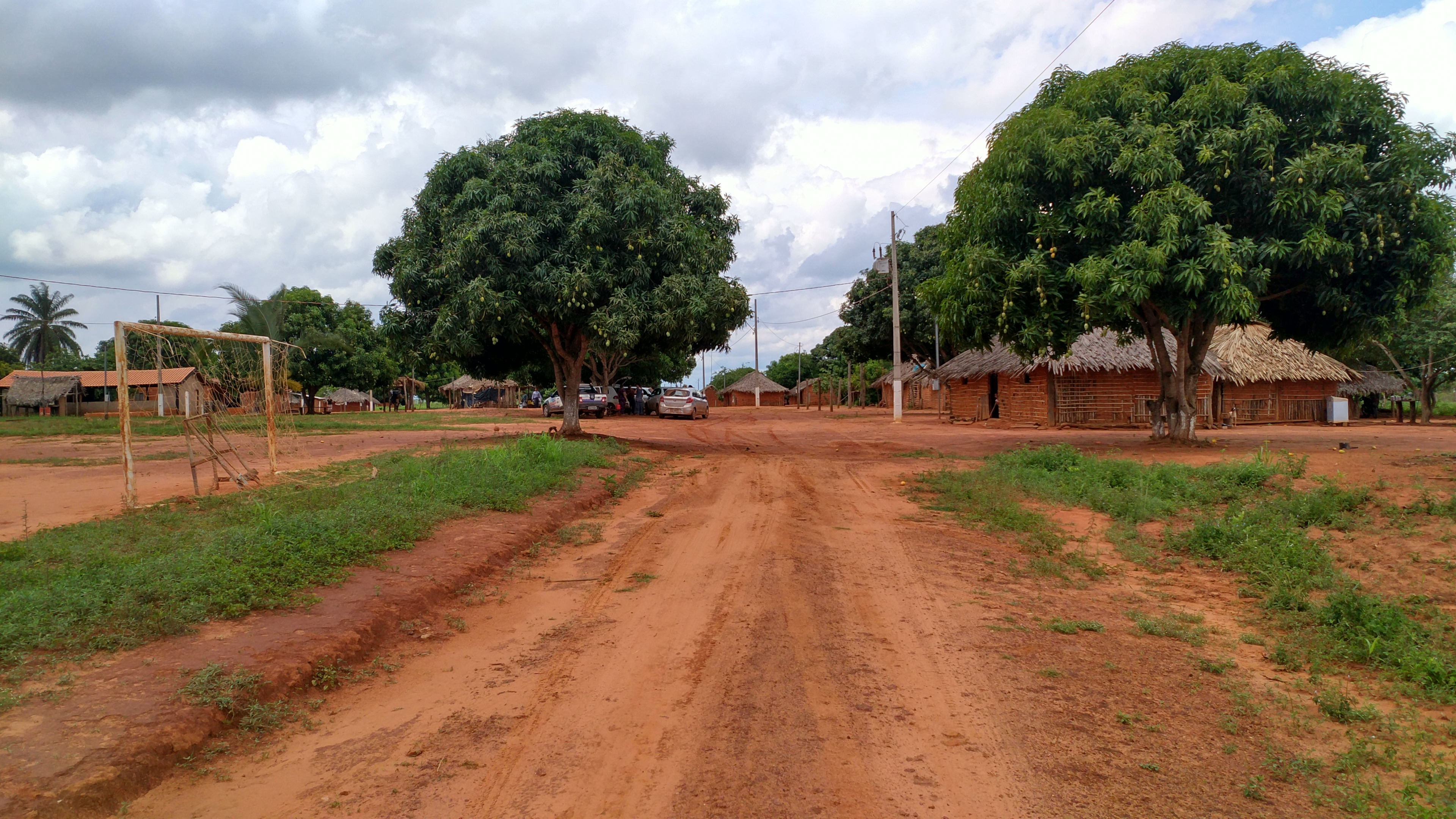 Entrada da Aldeia Nova Canaã (Bacairís)